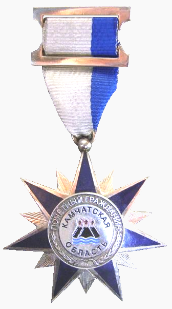 Нагрудный знак «Почётный гражданин Камчатской области»